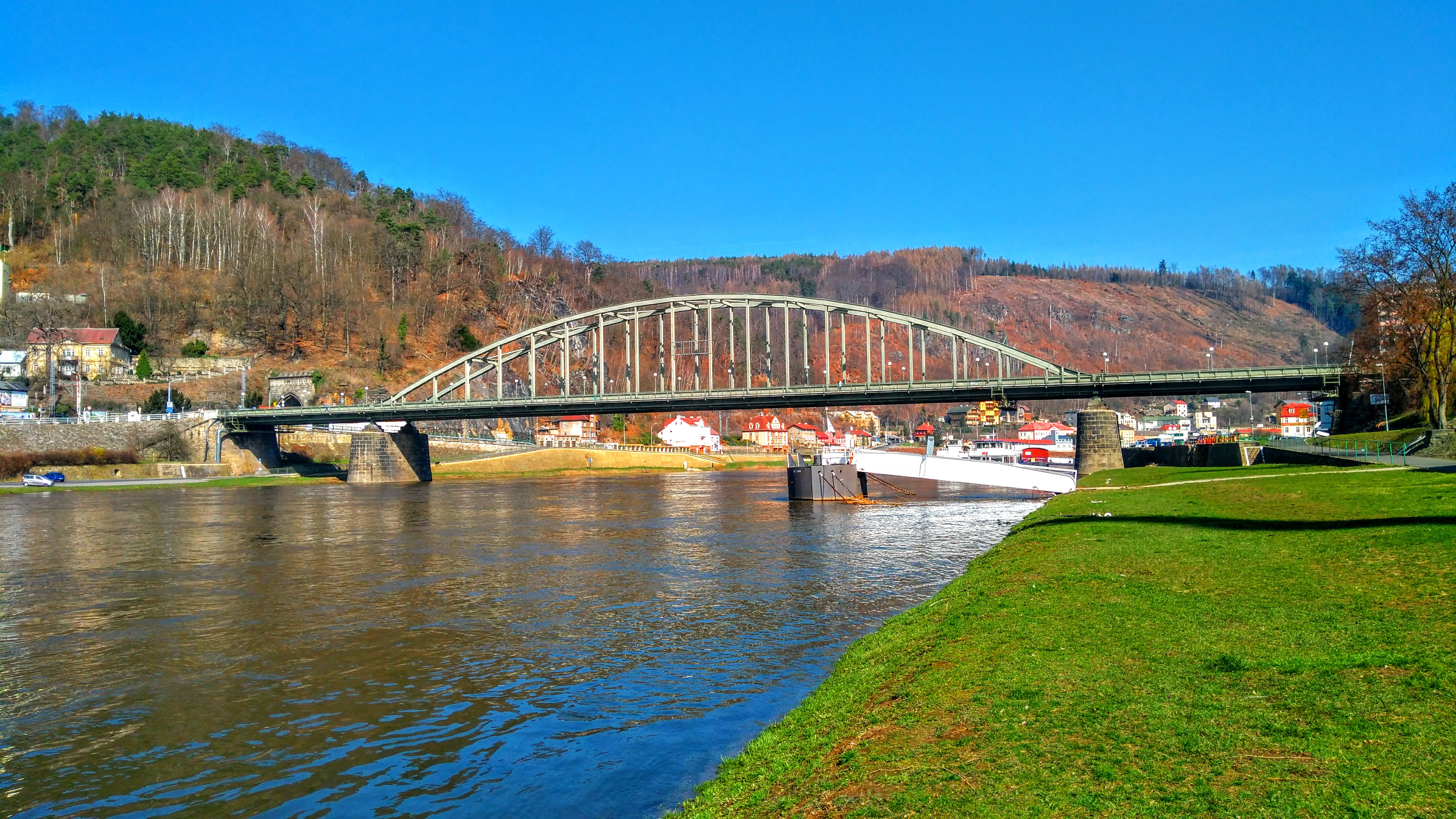 Tyršův most z pravého břehu Labe.